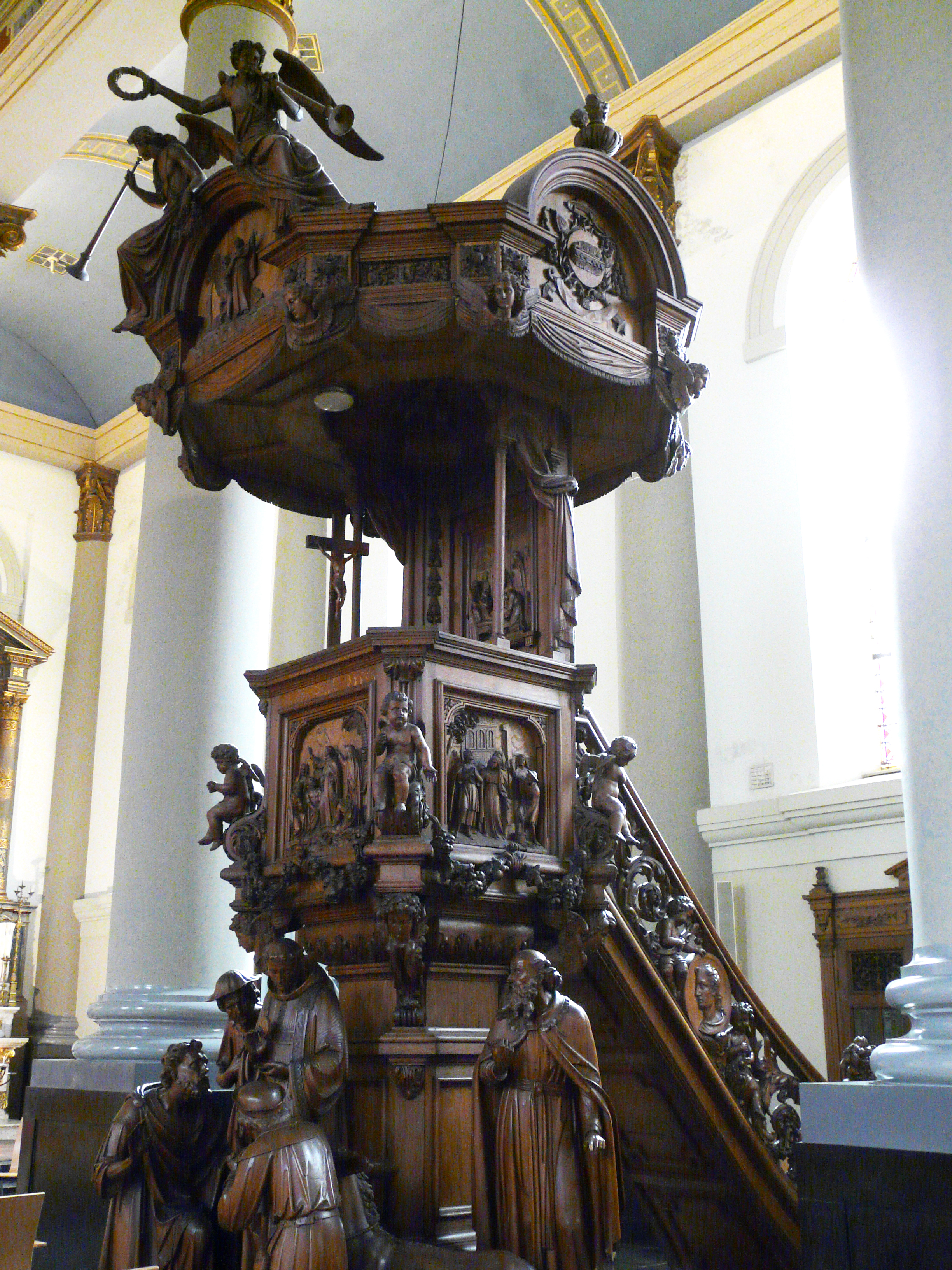 Sint-Antoniuskathedraal in Breda Centrum in Breda